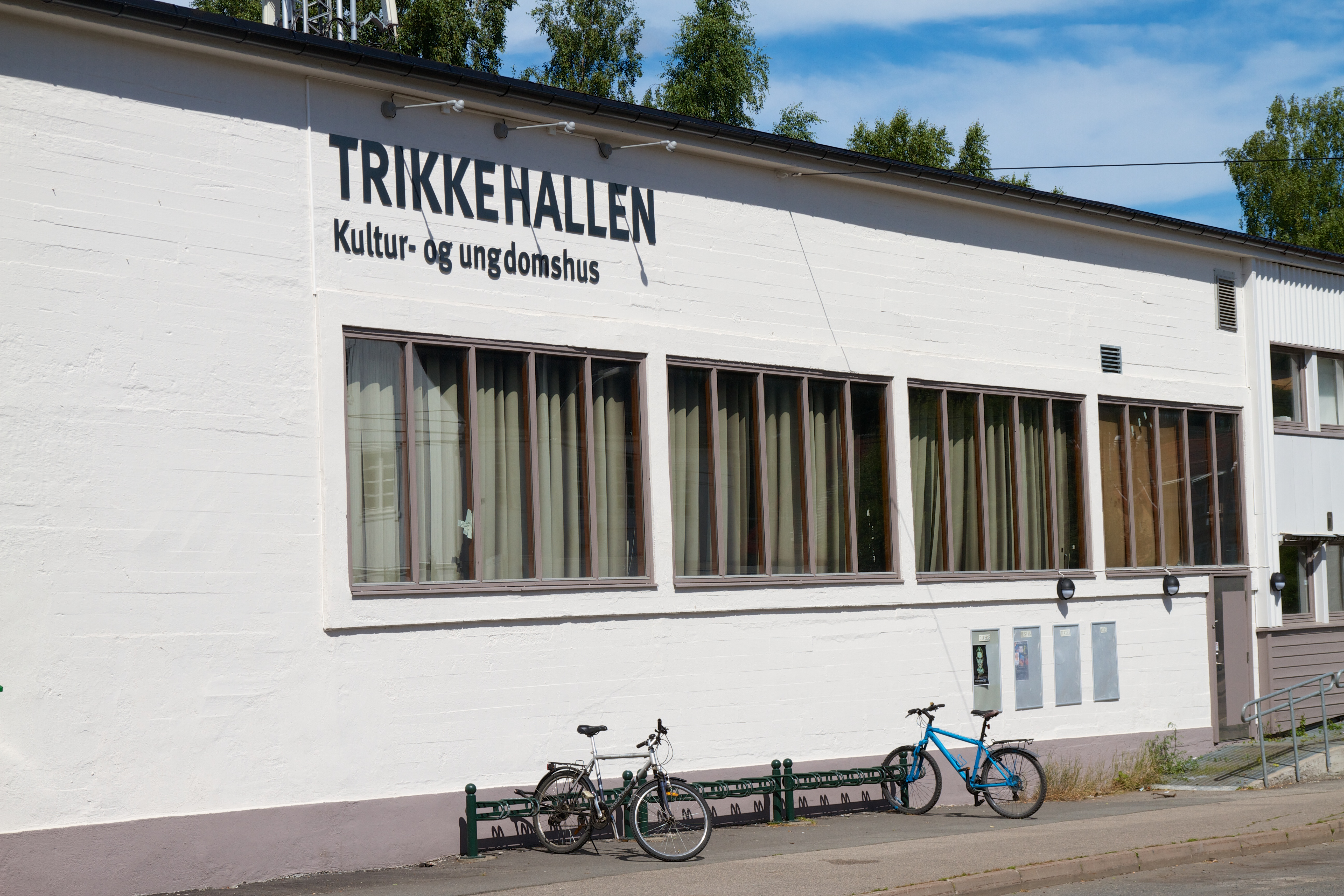 Trikkehallen på Kjelsås i Oslo.